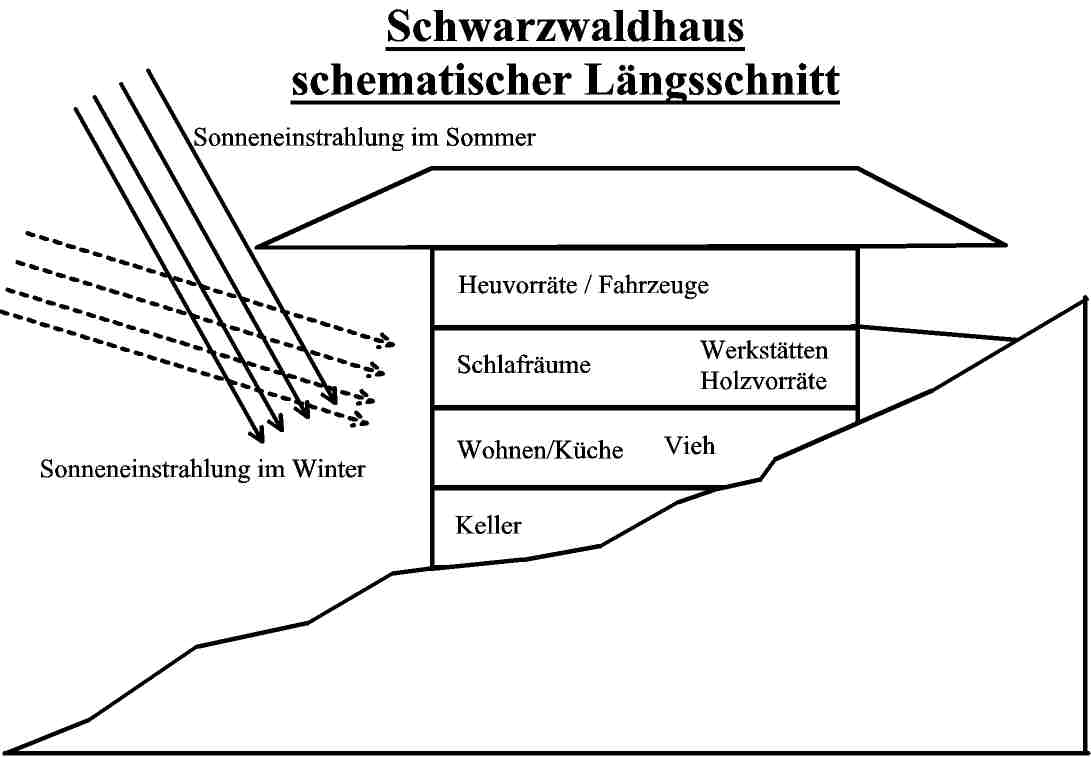 Schwarzwaldhaus / schematischer Längsschnitt